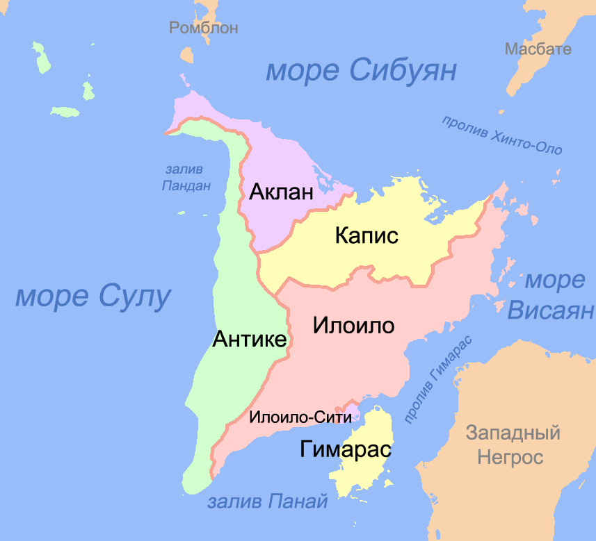 Карта провинций региона Западные Висайи (Филиппины)